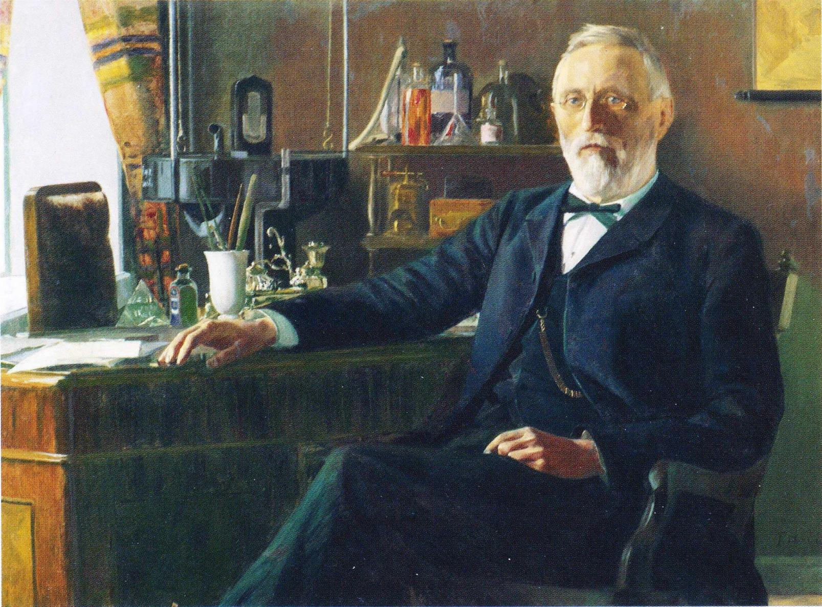 Professori Osvald Wasastjerna (1831–1917). Muotokuva kuuluu Helsingin yliopiston kokoelmiin.